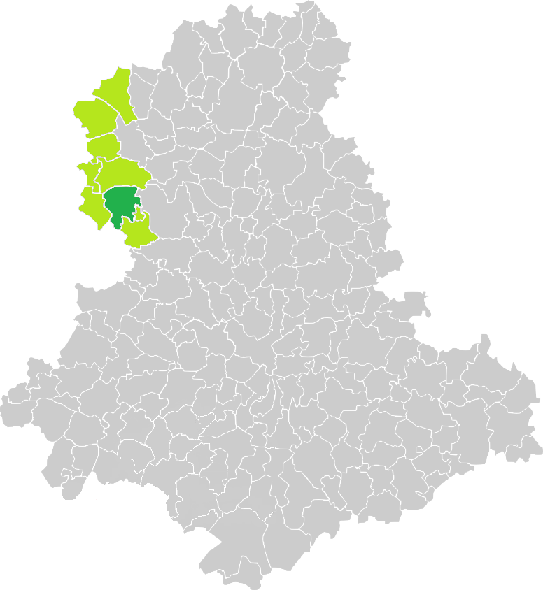 Carte de situation de la commune de Nouic (en vert foncé) dans le votre Canton (en vert clair) sur une carte des communes de la Haute-Vienne